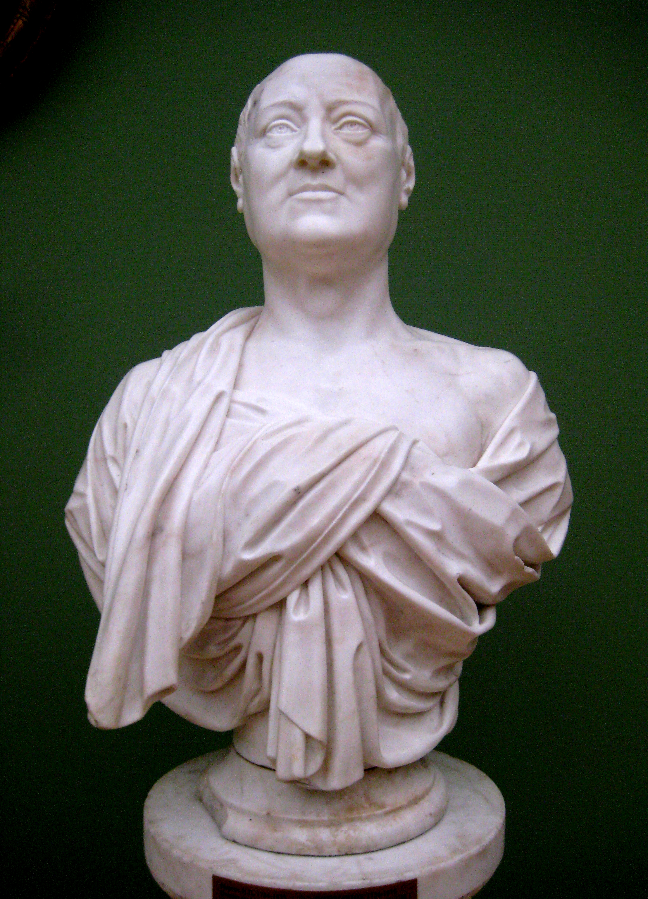 Бюст Никиты Ивановича Панина работы И.Мартоса. 1780. ГТГ